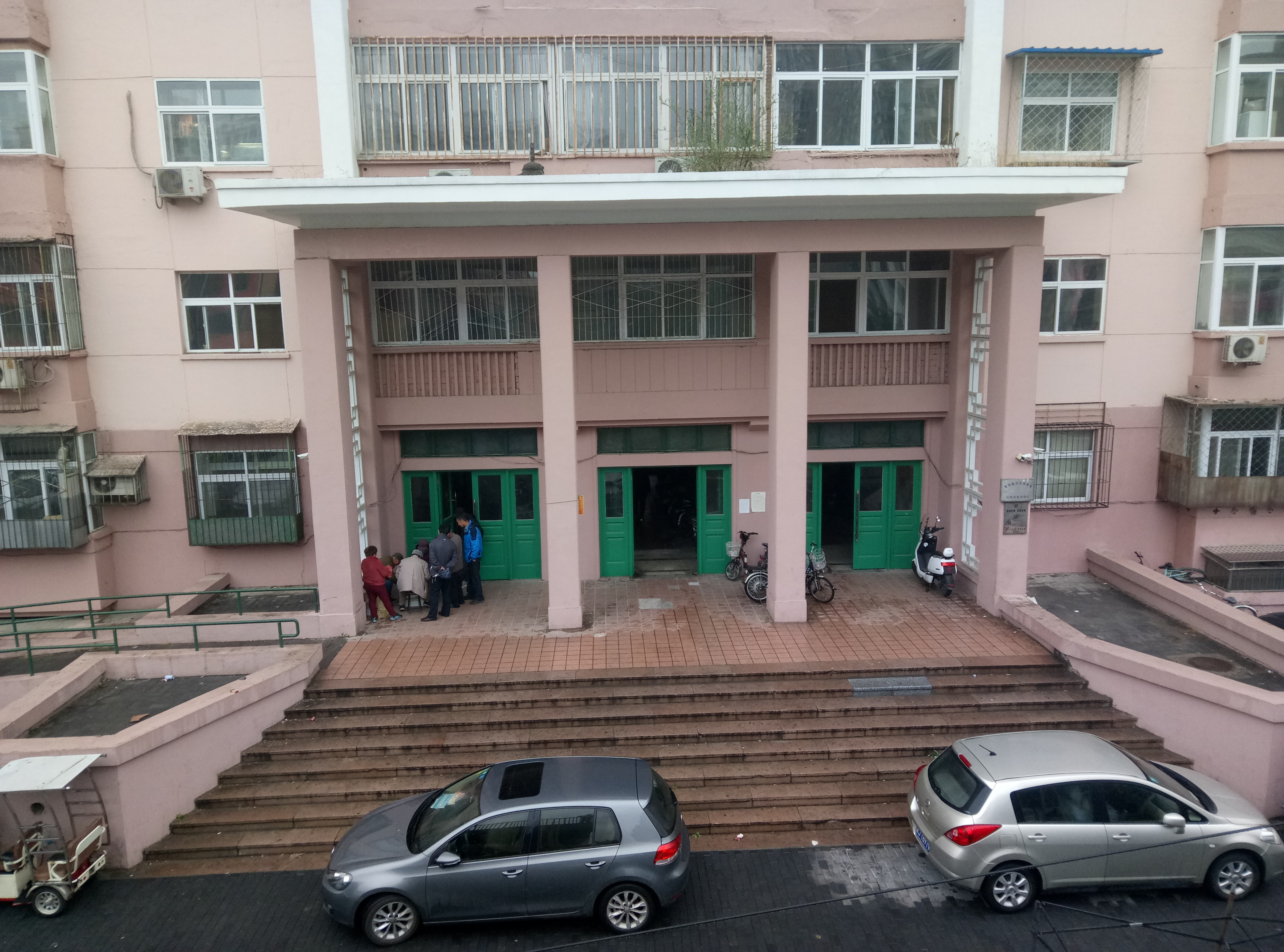 位于北京市东城区的安化楼。